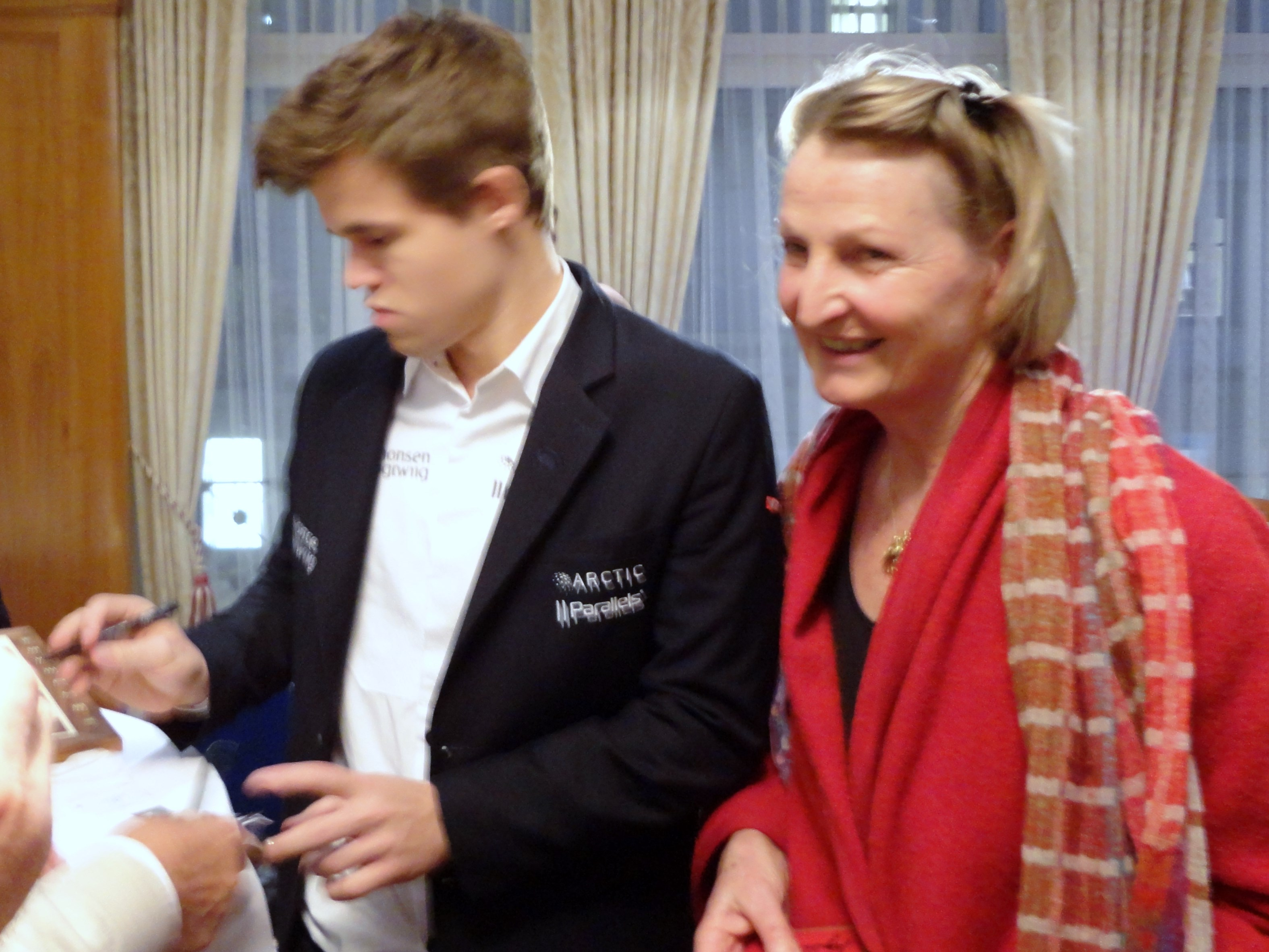 Magnus Carlsen, ZURICH CHESS CHALLENGE 2014, Rapid Chess am 4. Februar 2014 in Zürich / Schweiz.